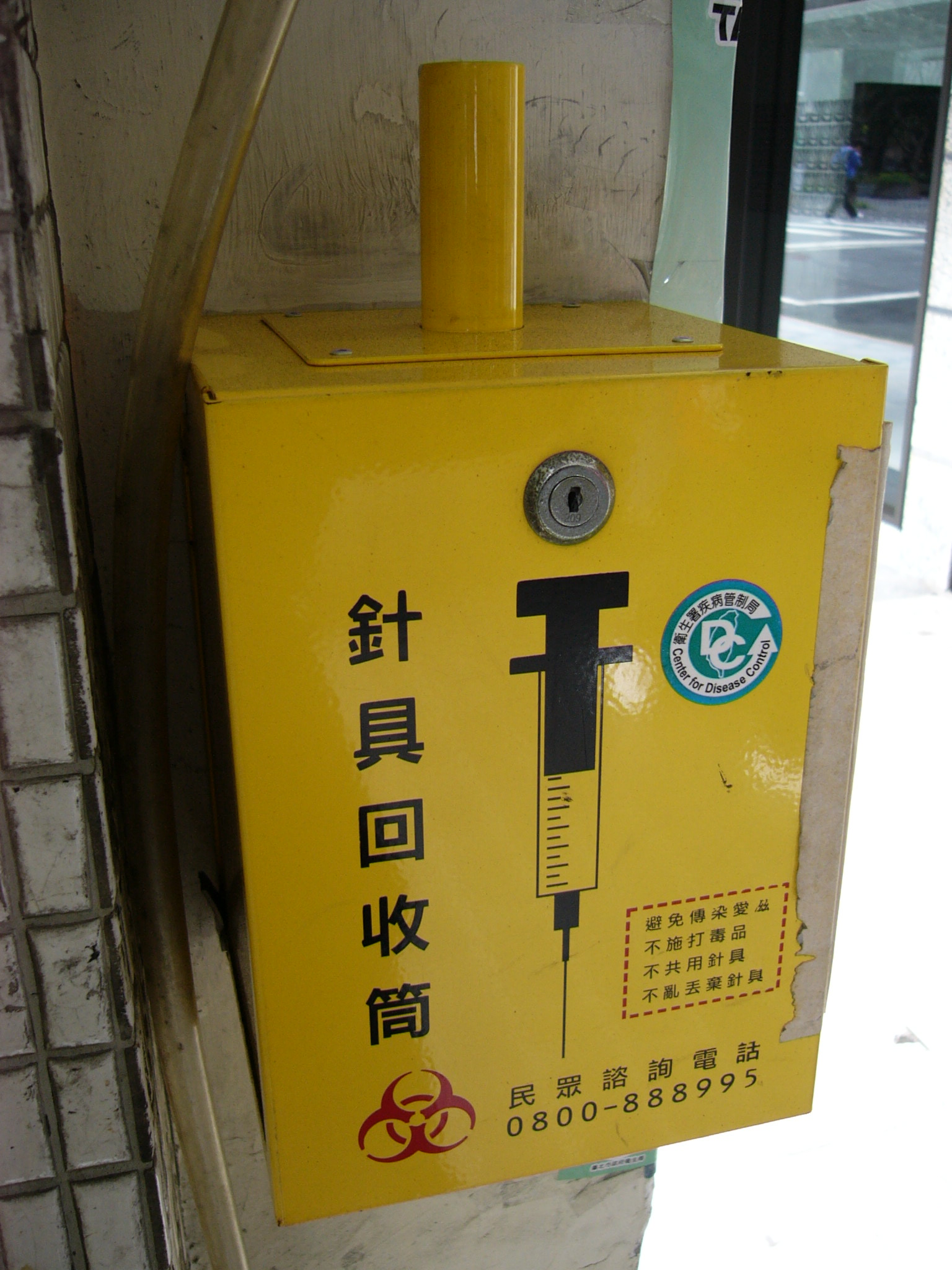 中華民國行政院衛生署疾病管制局設置的針具回收筒。